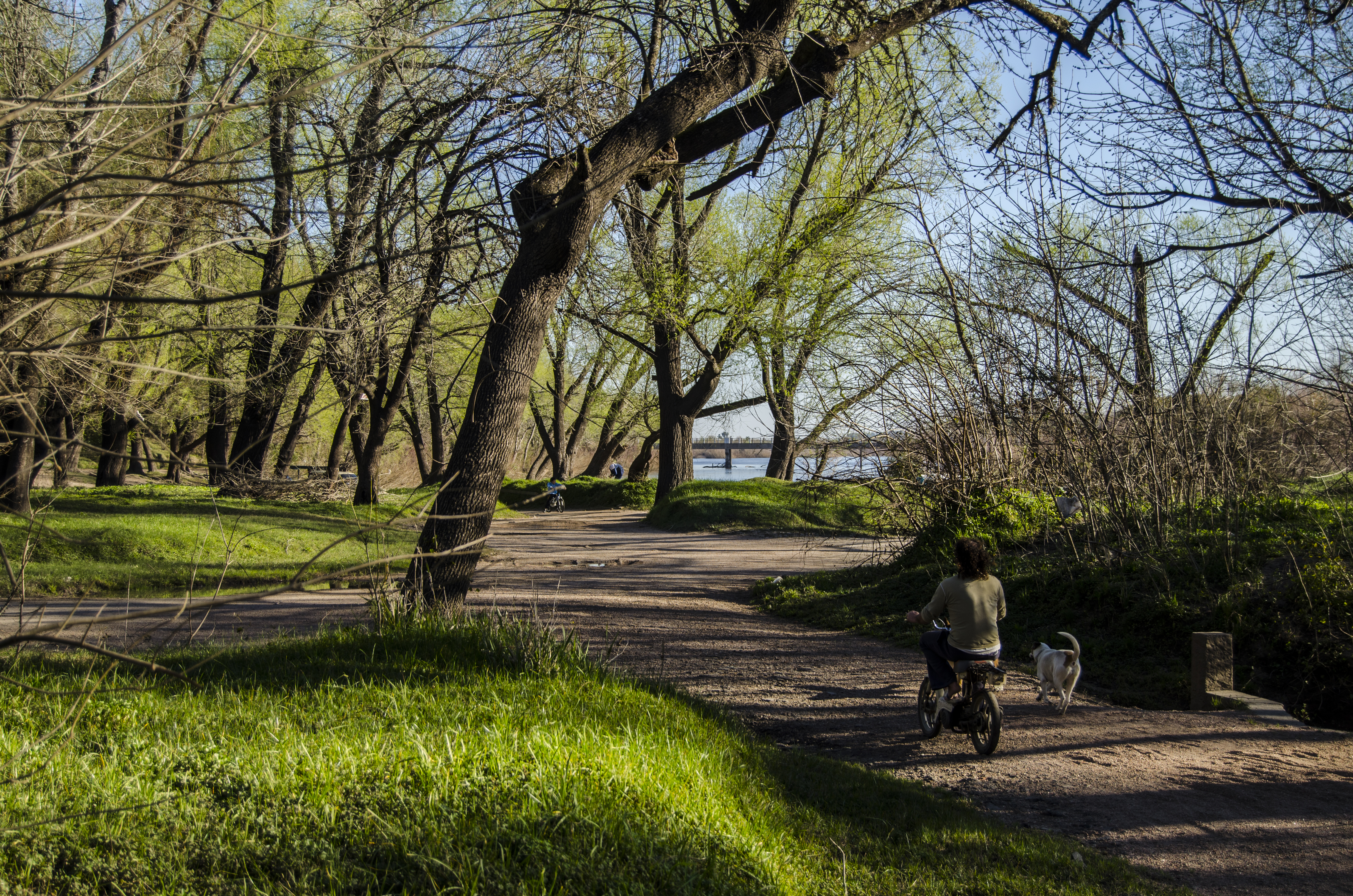 Parque Municipal Clemente Estable. Ubicada en el departamento de Canelones